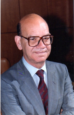 Enzo Vicari, prefetto di Milano